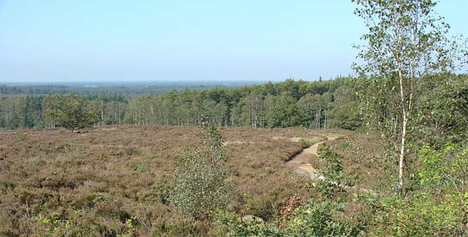 Sallandse Heuvelrug (omgeving Nijverdal)